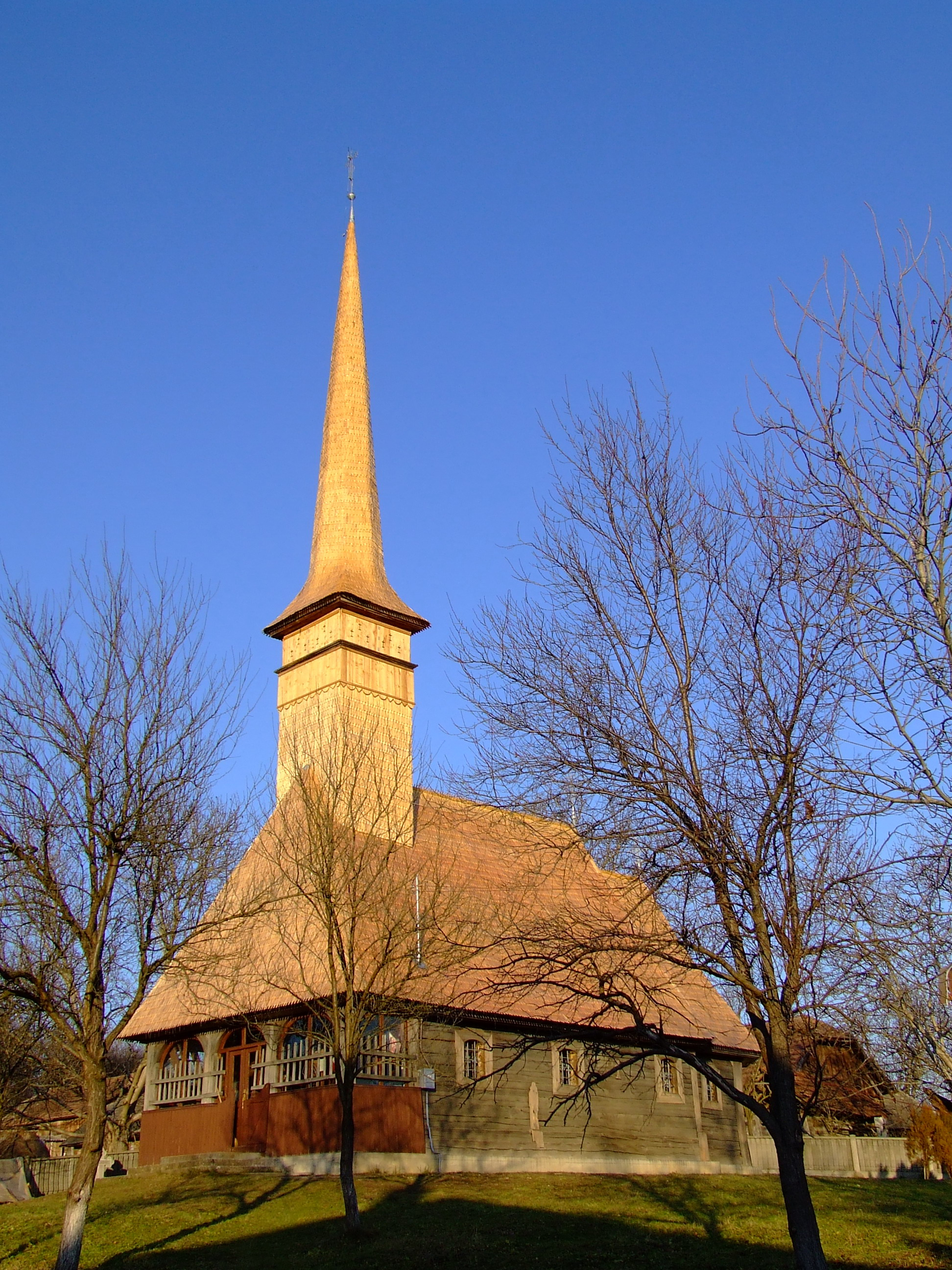 Biserica de lemn din Răstoci, judeţul Sălaj. Autor: Bogdan Ilieş Data: noiembrie 2006 Categorie:Biserici de lemn din Sălaj (imagini)